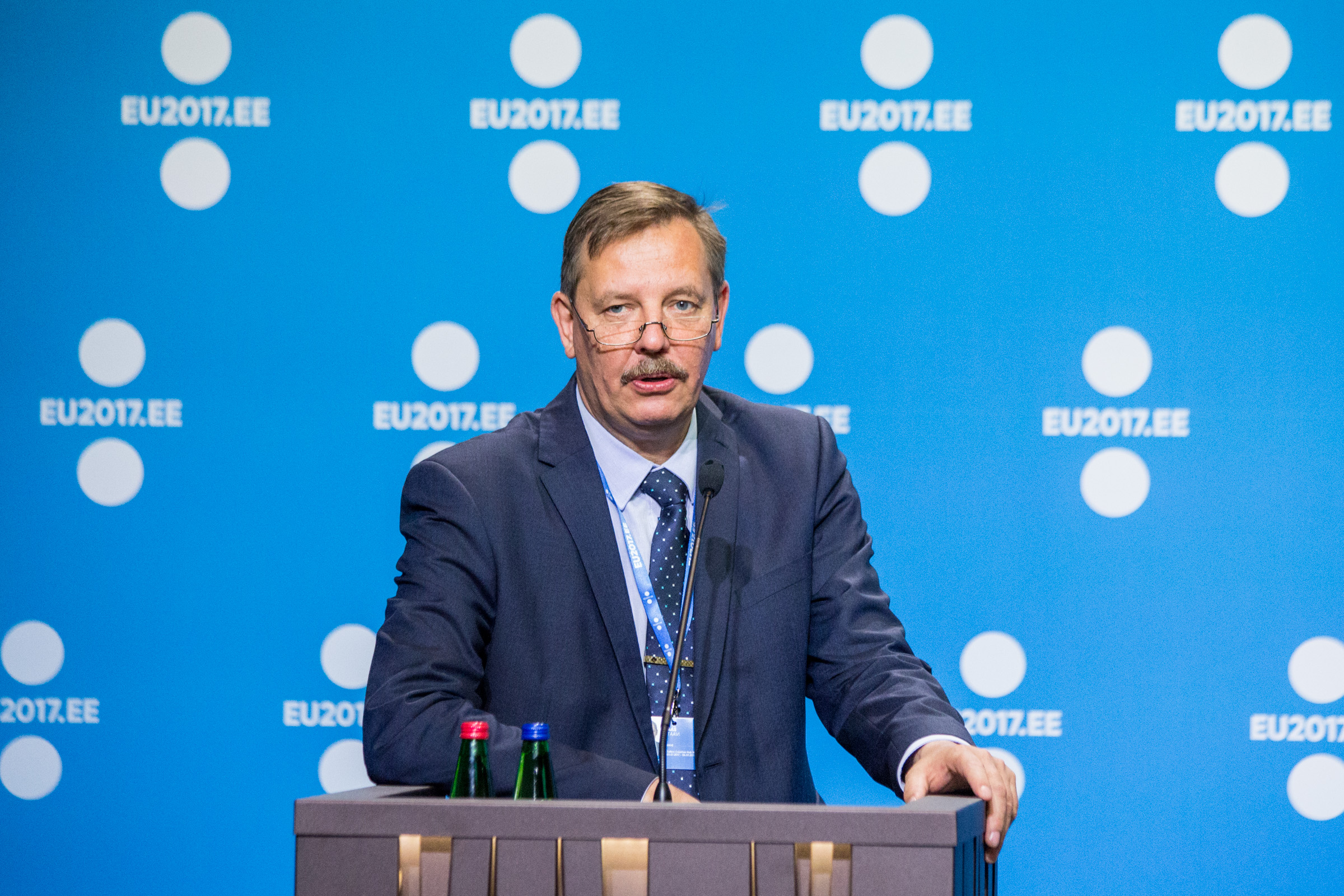 Taavi Aas, Tallinna linnapea kohusetäitja